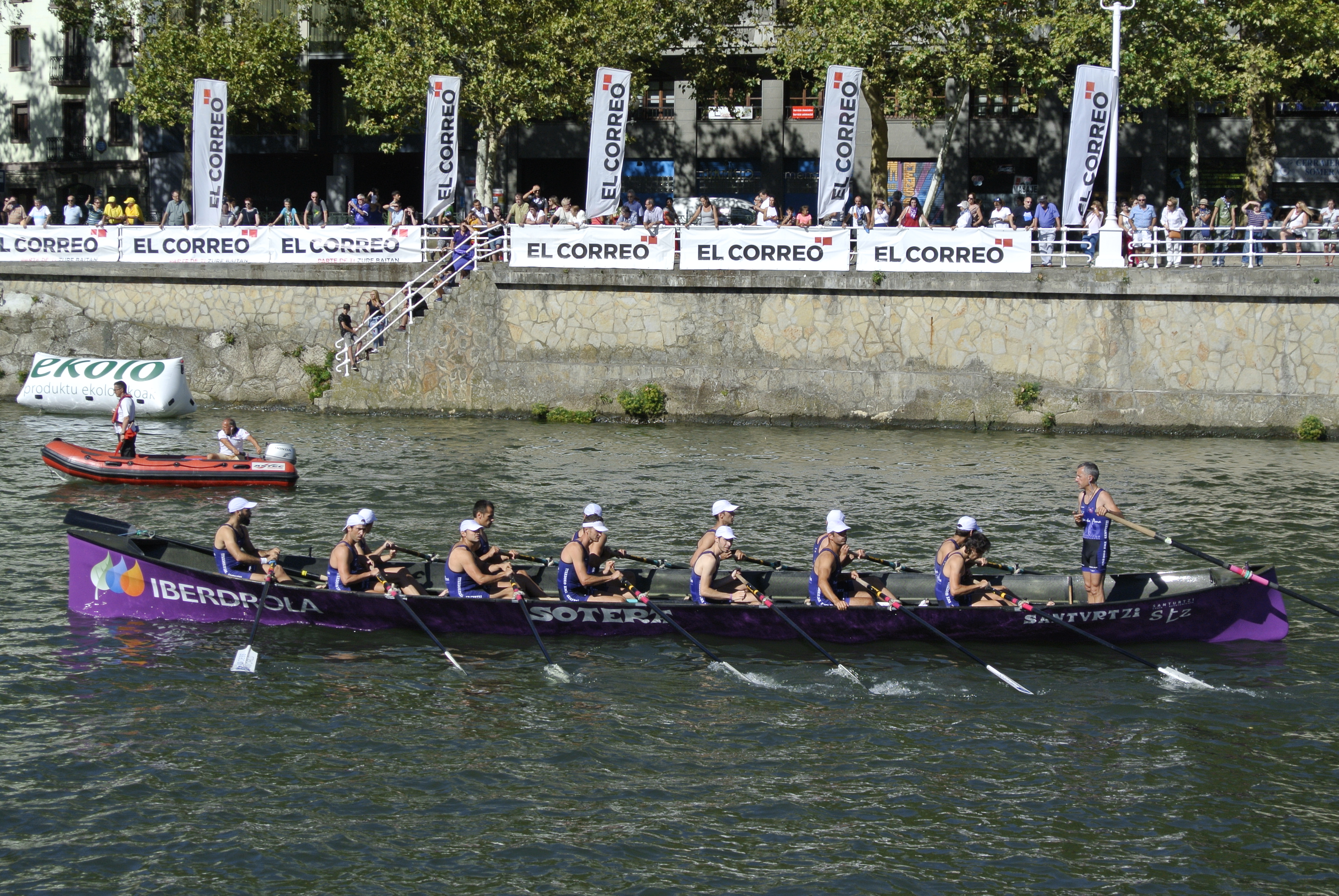 Trainera de Santurce en Bilbao, en la última jornada de la liga ARC-1